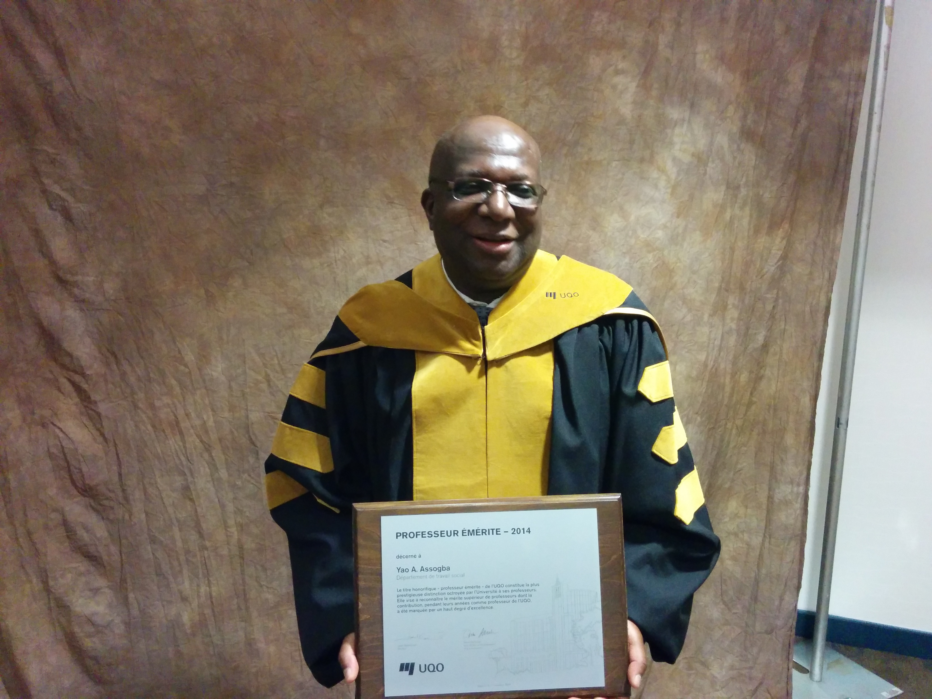 Yao Assogba devient professeur émérite en 2014.